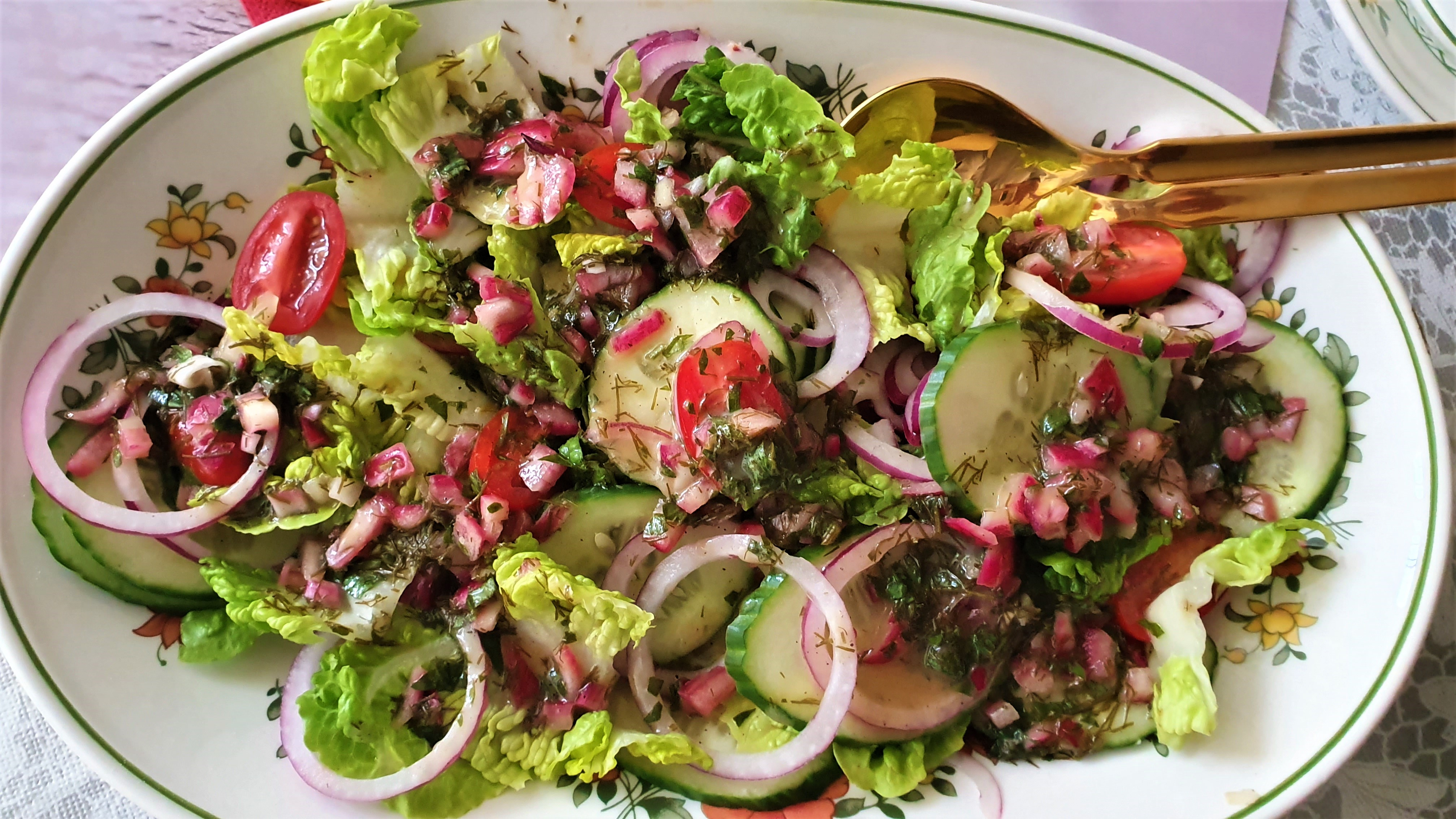 Gemischter Salat